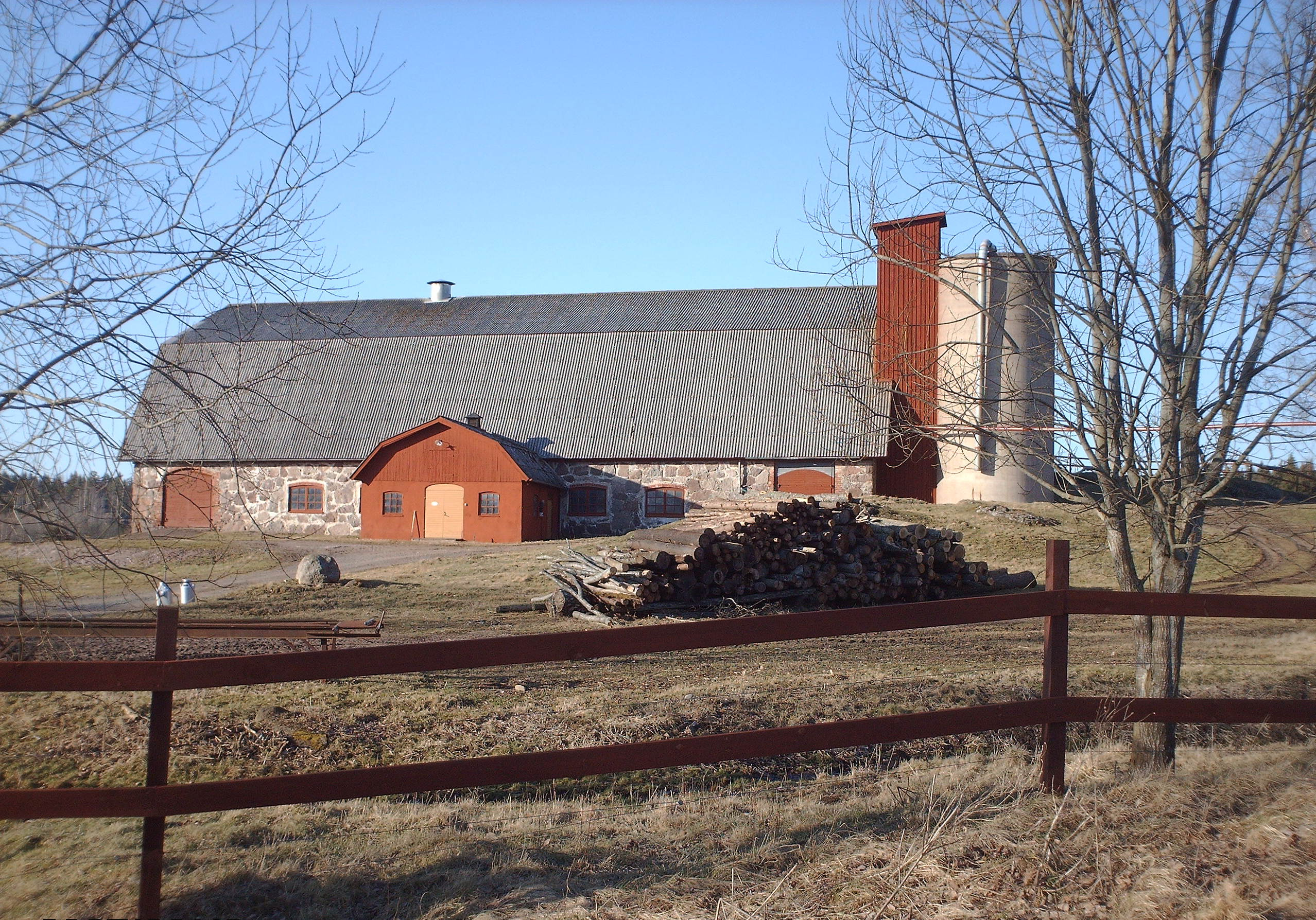 Medevi gård, Östergötland, Sweden.